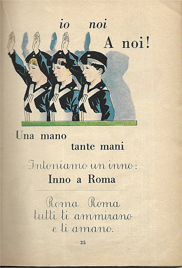 Il libro della prima classe - Inno, a Roma - pag.25